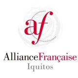 Figura representativa de la Alianza Francesa de Iquitos.